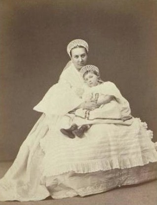 Княгиня Мария Александровна Мещерская, ур. Панина (1830—1903) с дочерью Софьей (1867—1942).